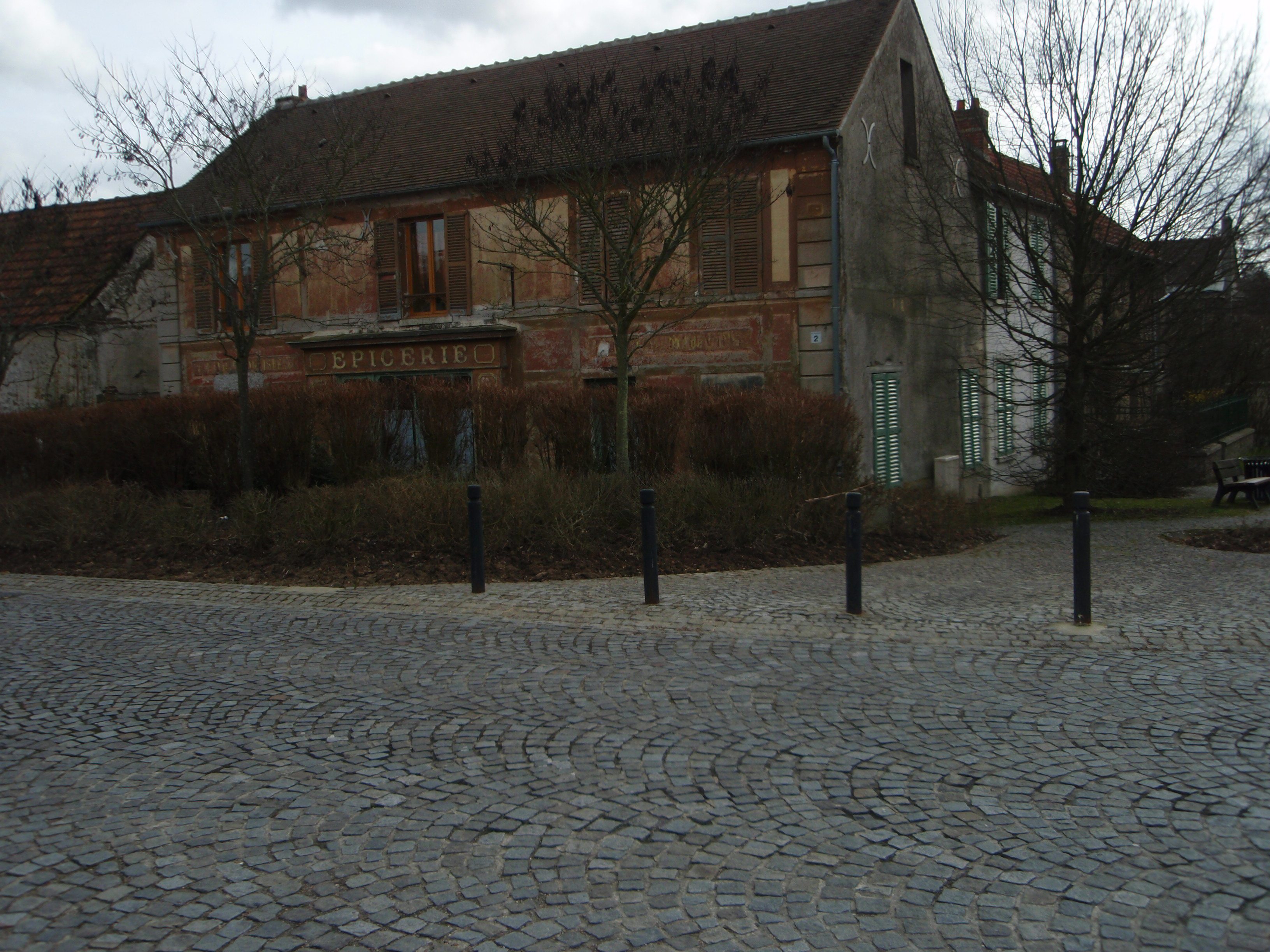 L'ancien café de Bouviers en 2008